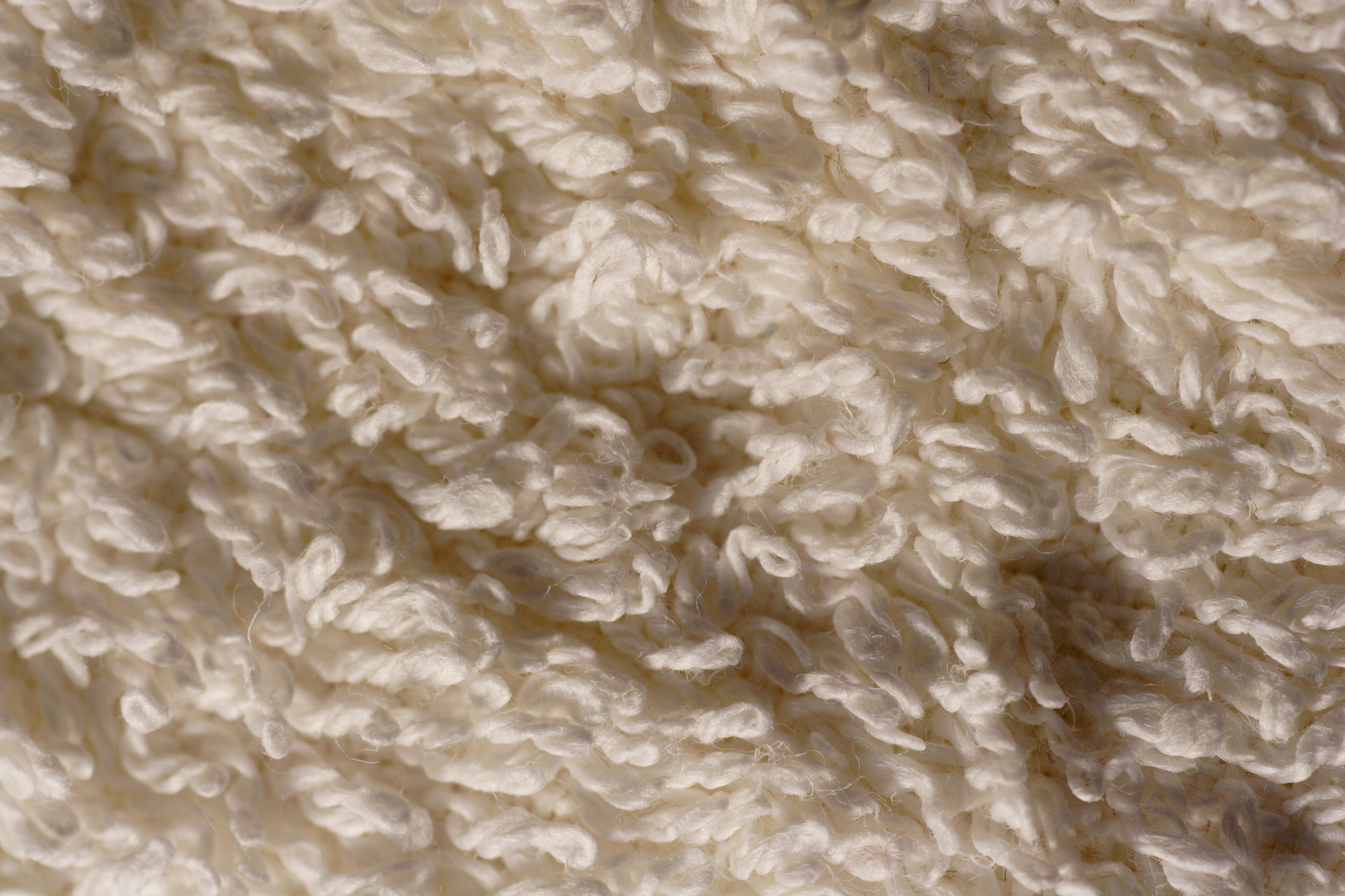 Frottee Toweling